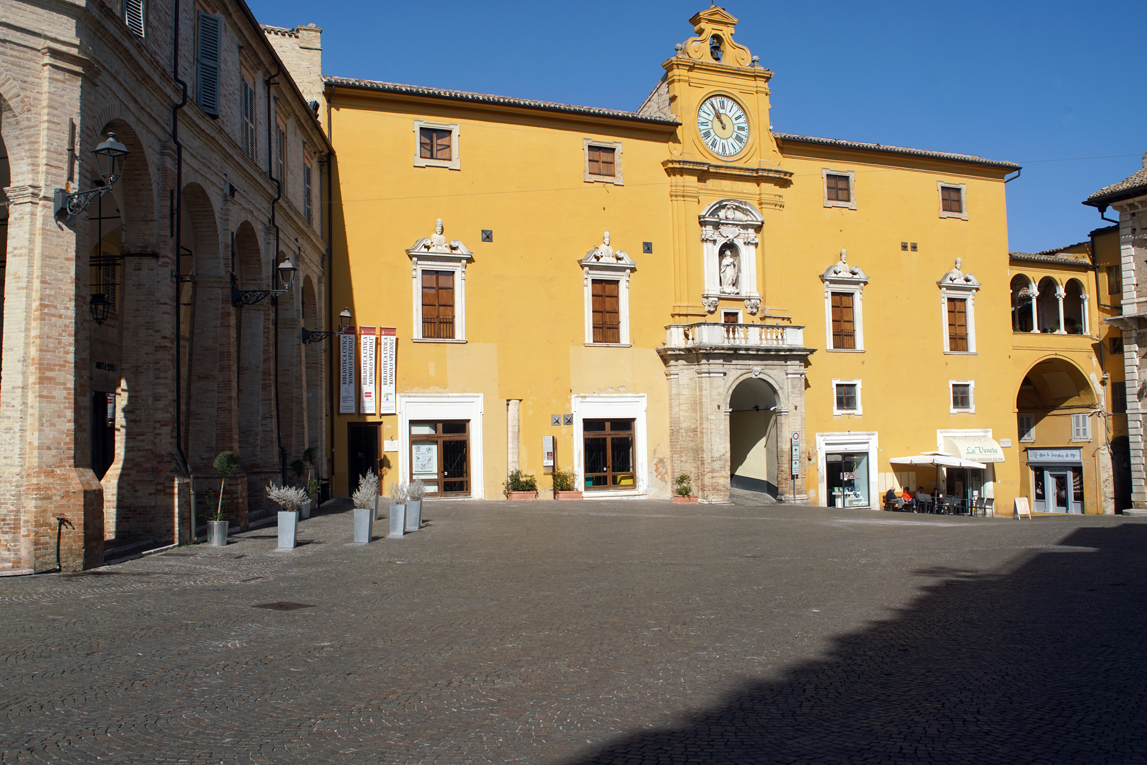 Palazzo degli Studi - Biblioteca Civica Romolo Spezioli This is a photo of a monument which is part of cultural heritage of Italy.